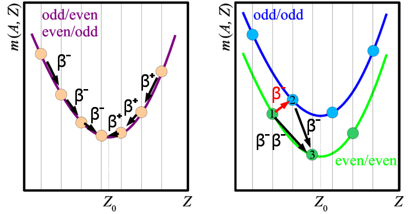 Massenparabeln für Kerne mit ungeradem A und odd/odd- bzw. even/even-Kerne zur Erläuterung des doppelten Beta-Zerfalles.